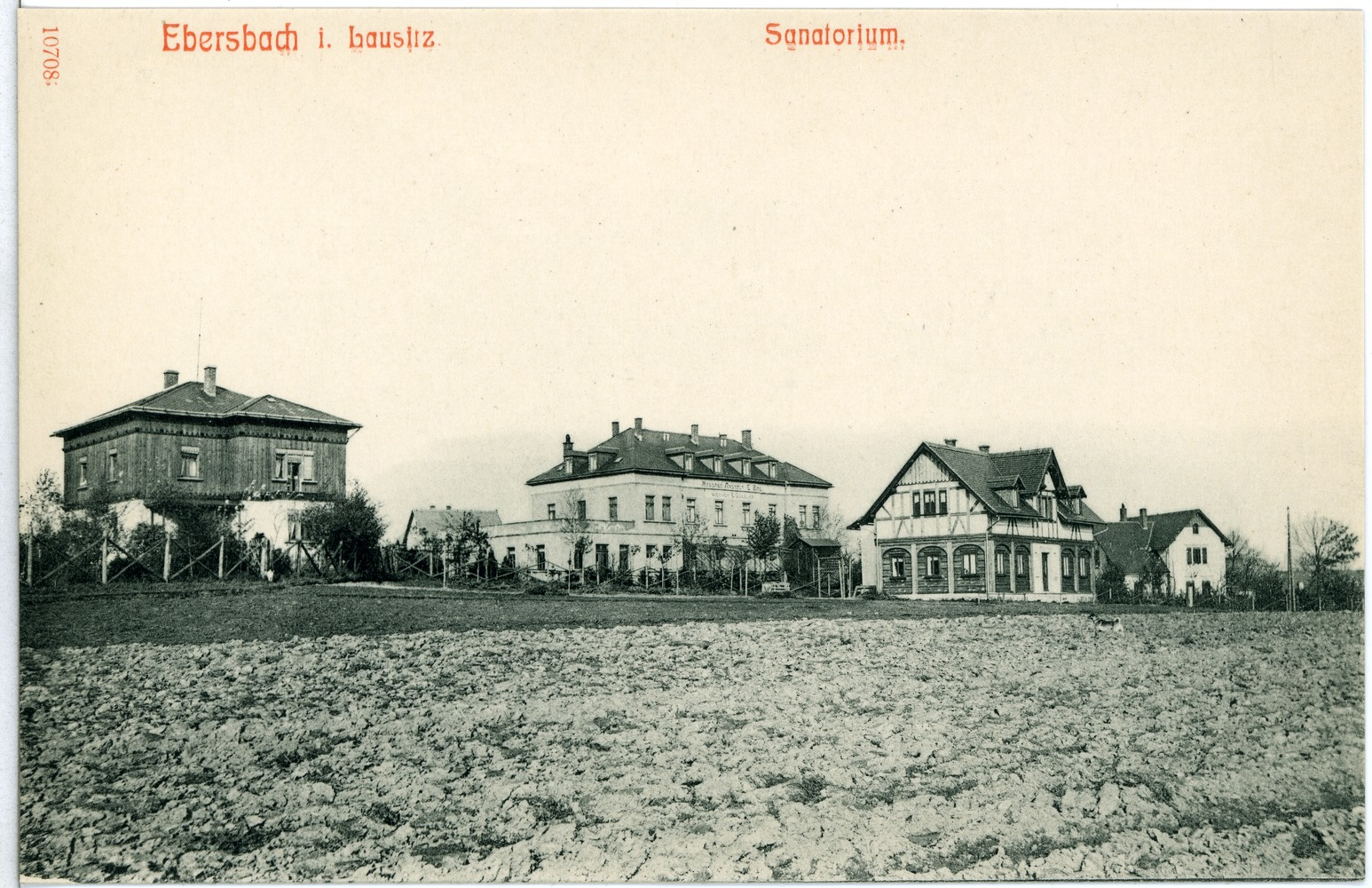 Ebersbach; Santorium This postcard is from publisher Brück & Sohn in Meißen ( postcard has a unique number 10708 and is available in a higher resolution at the publisher. This images was uploaded in a cooperation project between Wikipedians and the publisher.